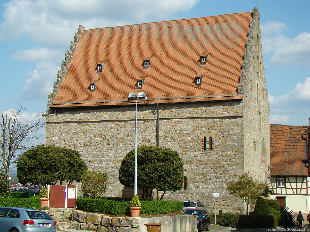 Bad Wimpfen, Burgviertel: Steinhaus der Pfalz Wimpfen